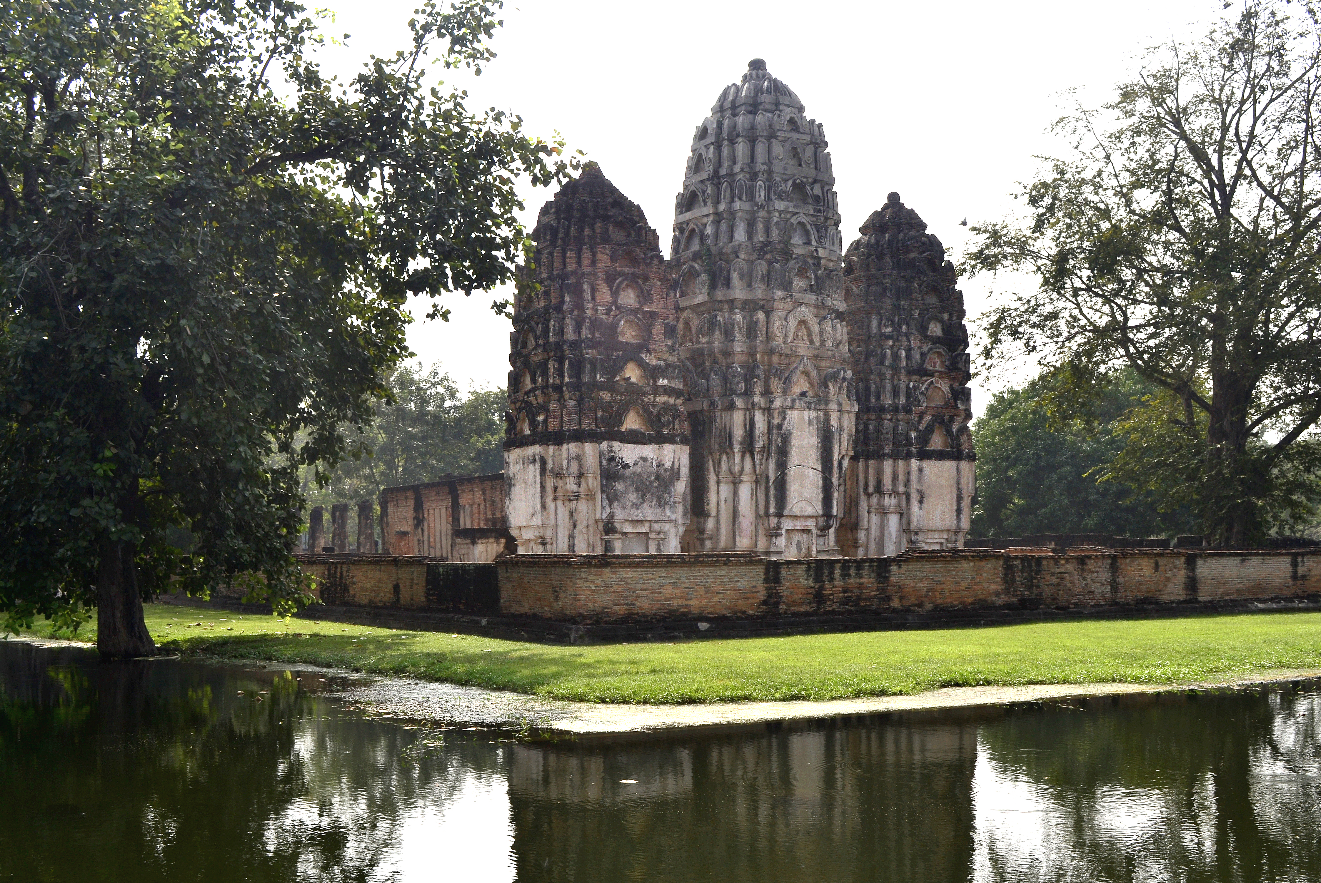 Wat Sri Sawai im Geschichtspark Sukhothai